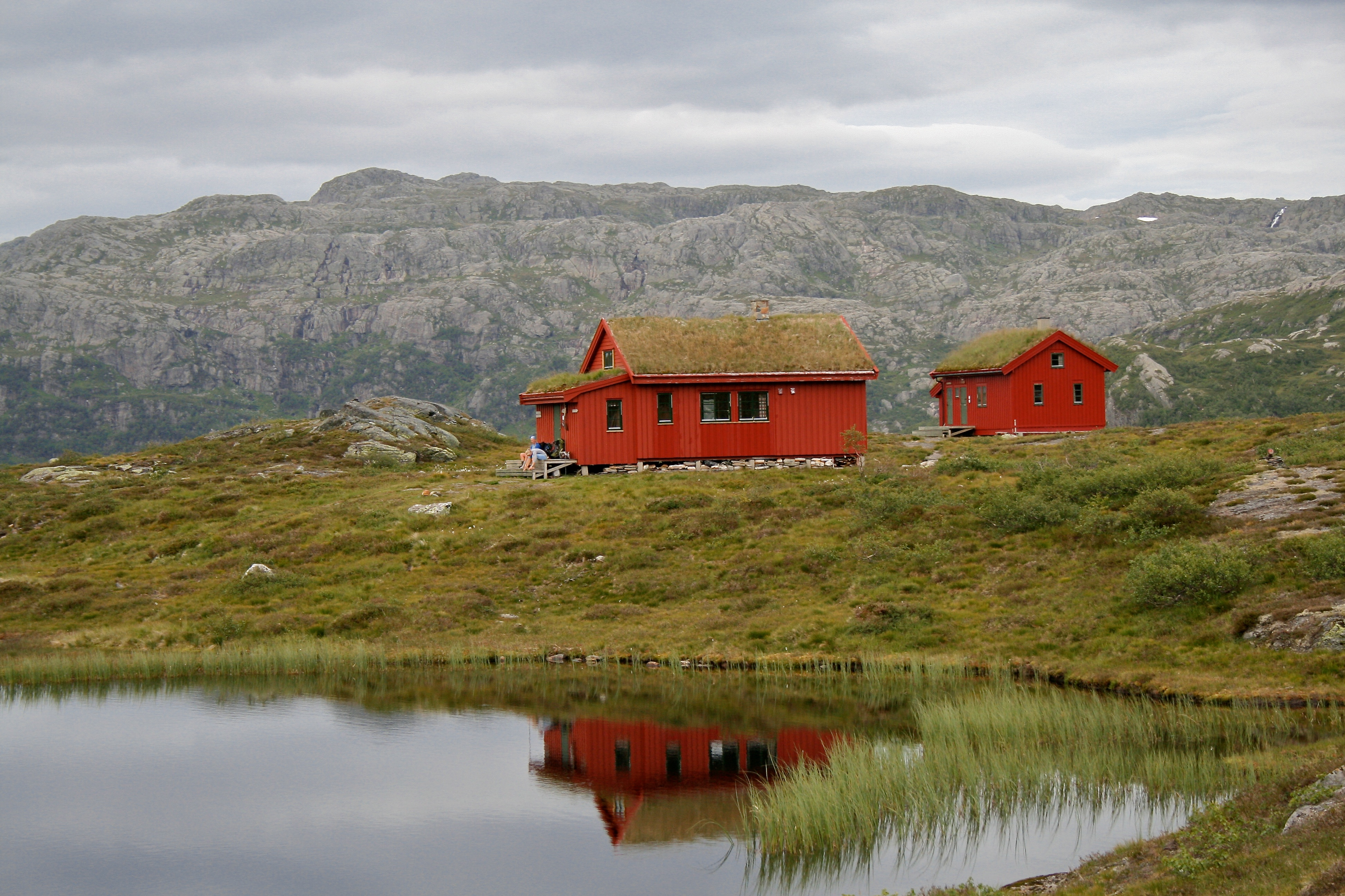 Simlebu i Etnefjellene